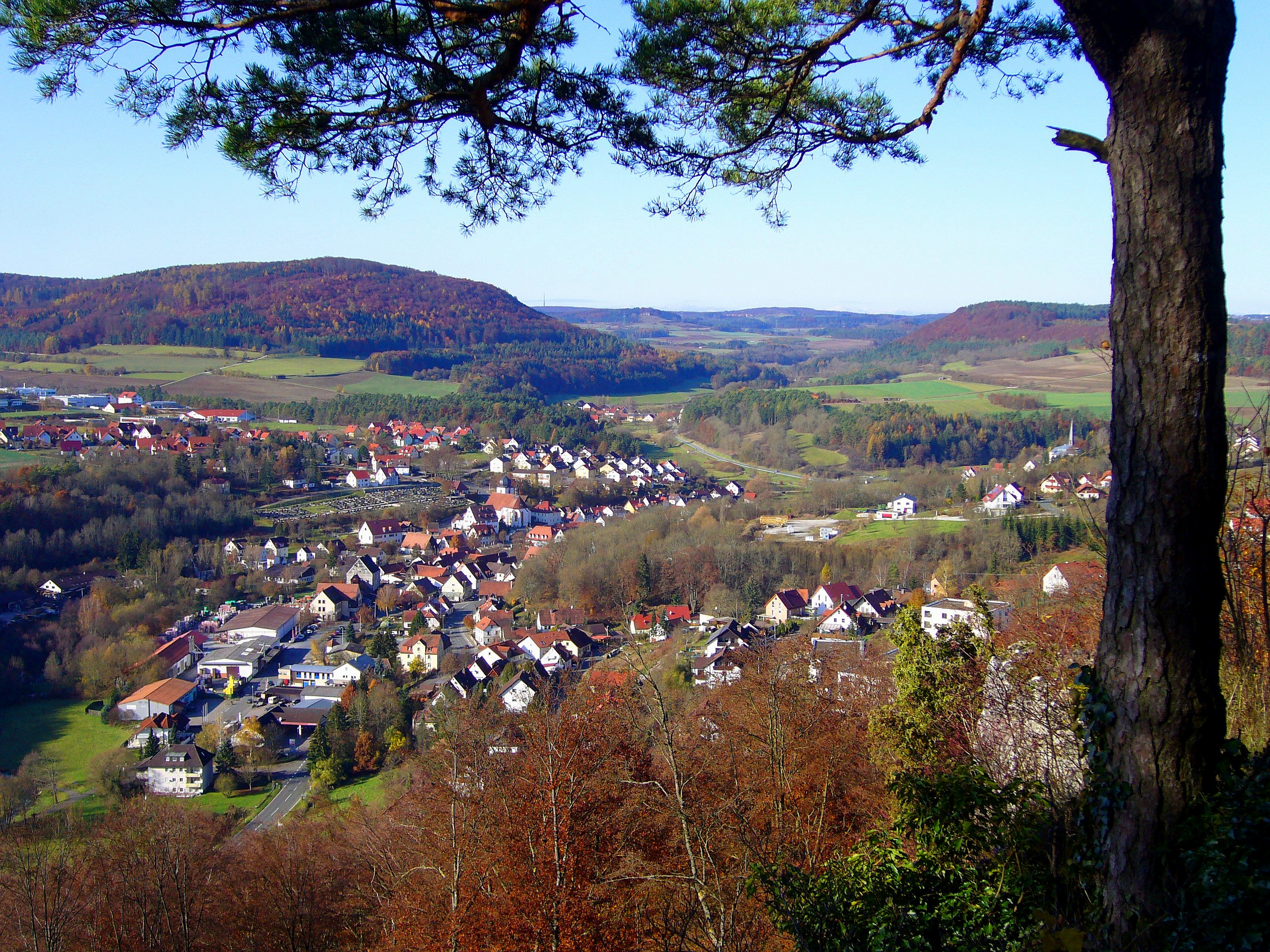 Heiligenstadt vom Pavillon Richtung Altenberg, Seigelstein und Lindach